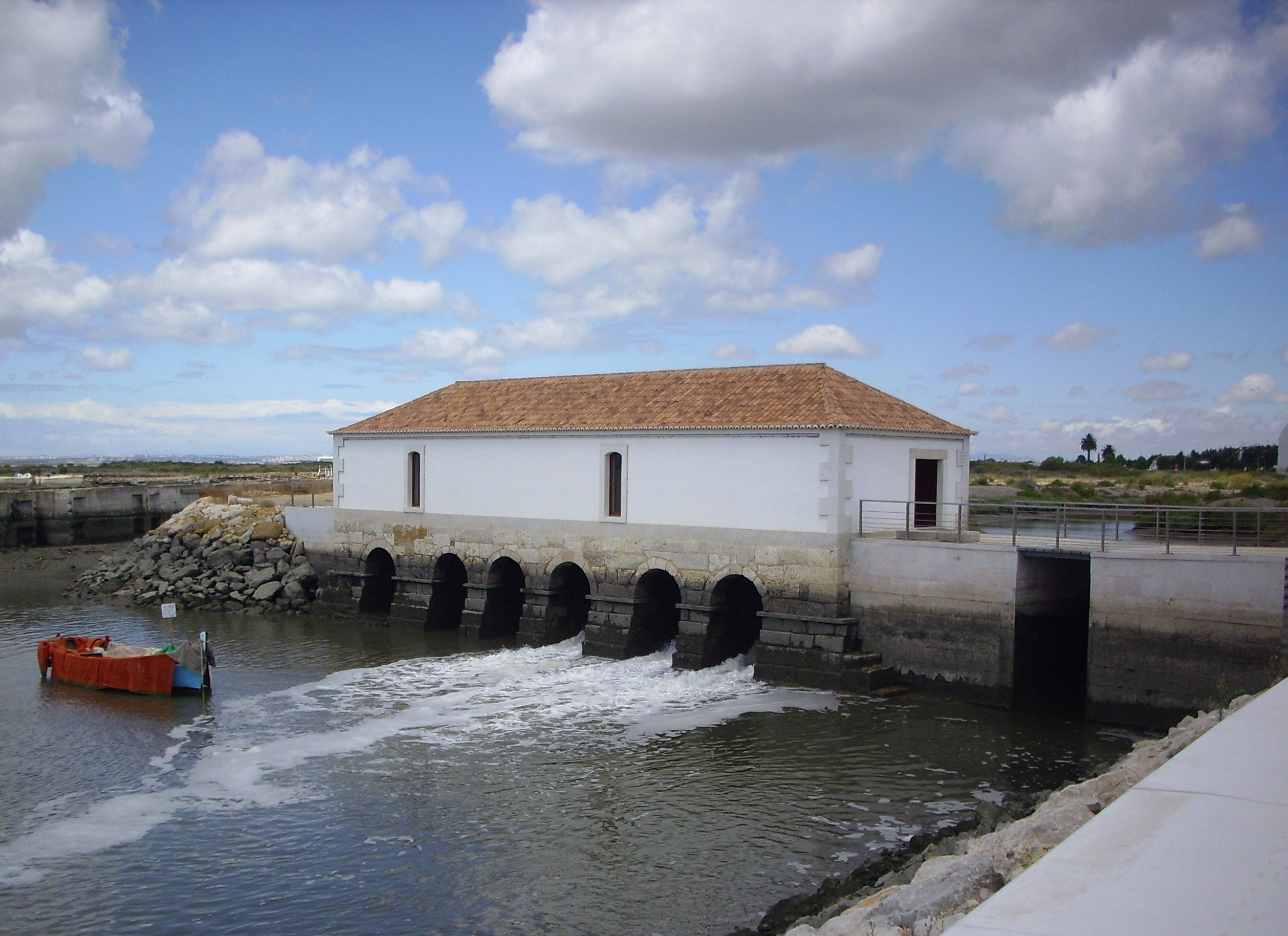 Montijo